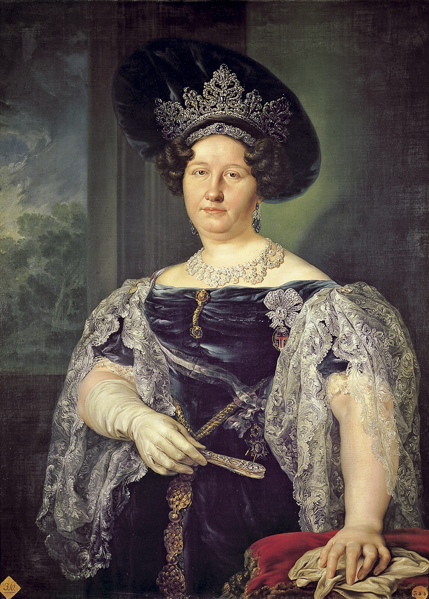 Retrato de la reina María Isabel de Borbón (1789-1848), que era hija del rey Carlos IV de España y de la reina María Luisa de Parma} y que pasó a ser reina consorte de las Dos Sicilias por su matrimonio con Francisco I de las Dos Sicilias.